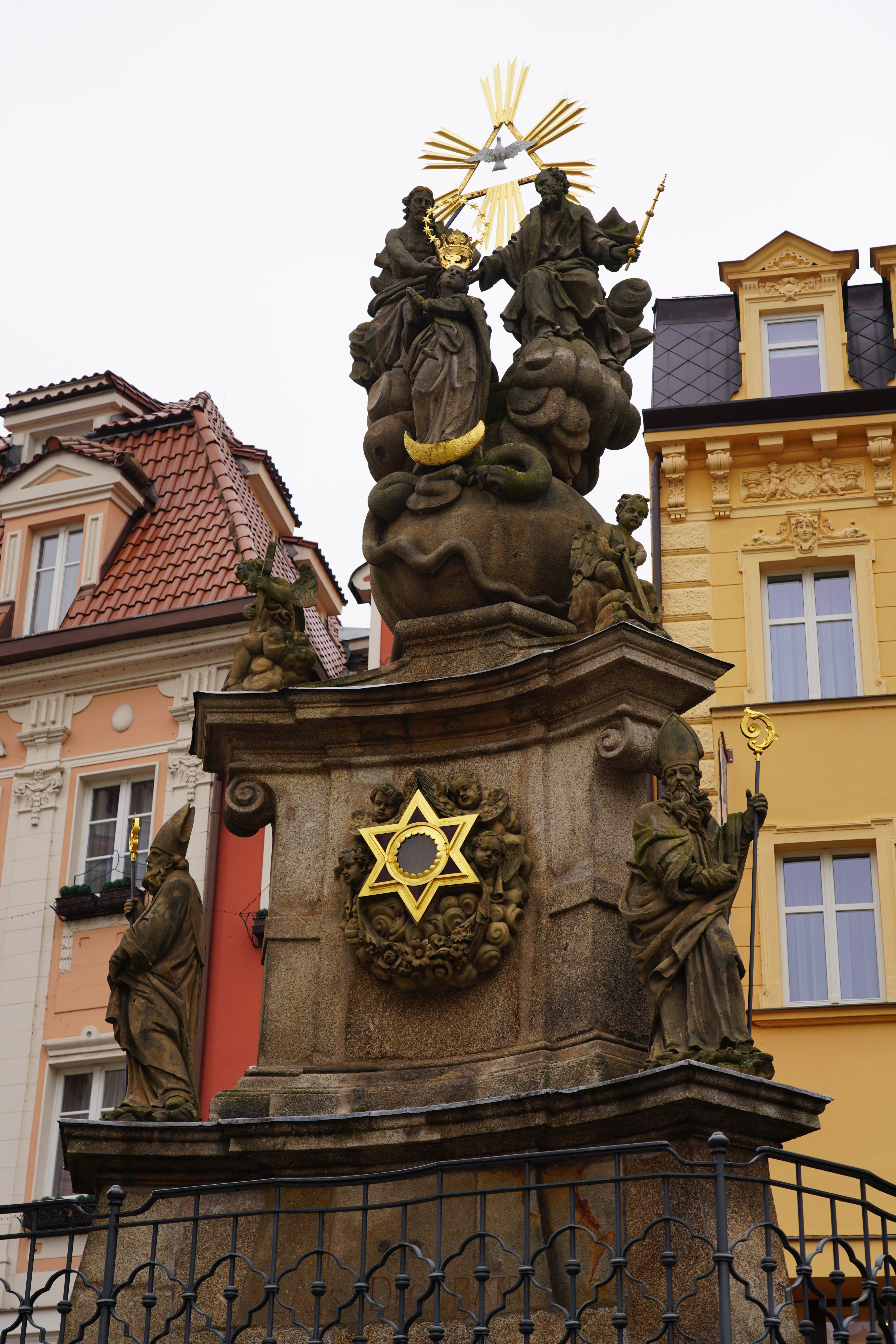 20190202_KarlovyVary_2738